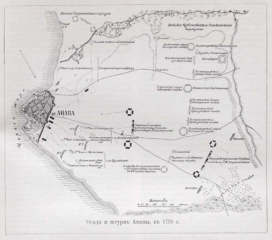 Данное изображение было использовано в статье «Анапа» опубликованной во втором томе «Военной энциклопедии», который был издан книгоиздательским товариществом Ивана Дмитриевича Сытина в 1911 году в столице Российской империи городе Санкт-Петербурге.